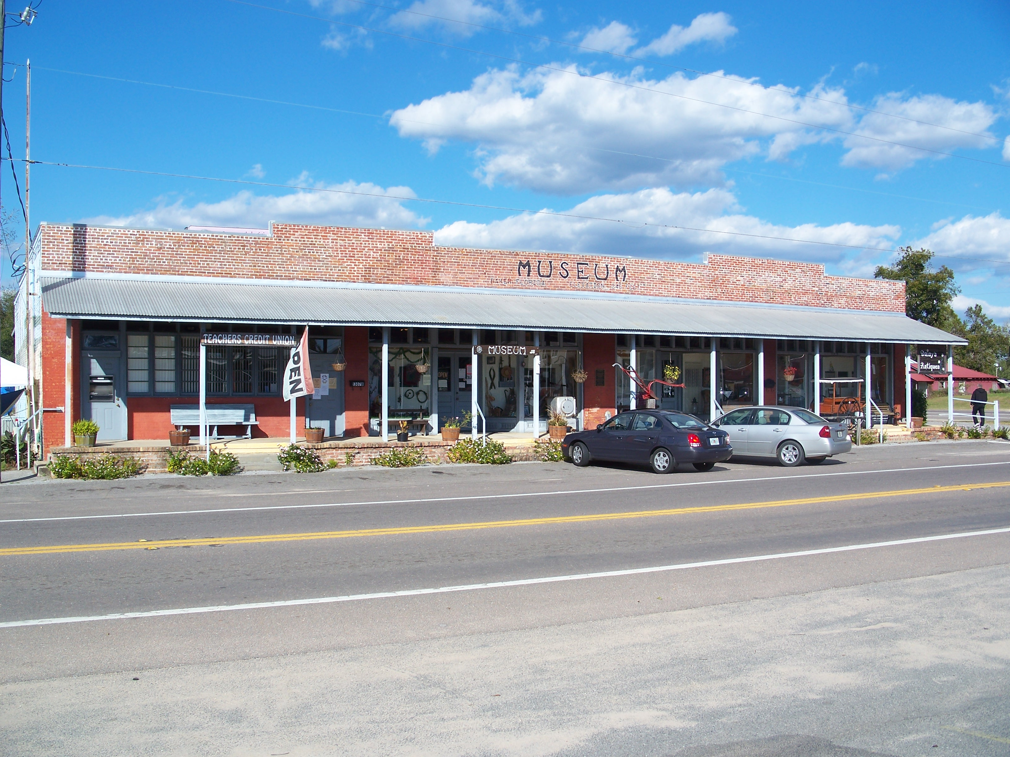 Baker, Florida: Baker Block Museum